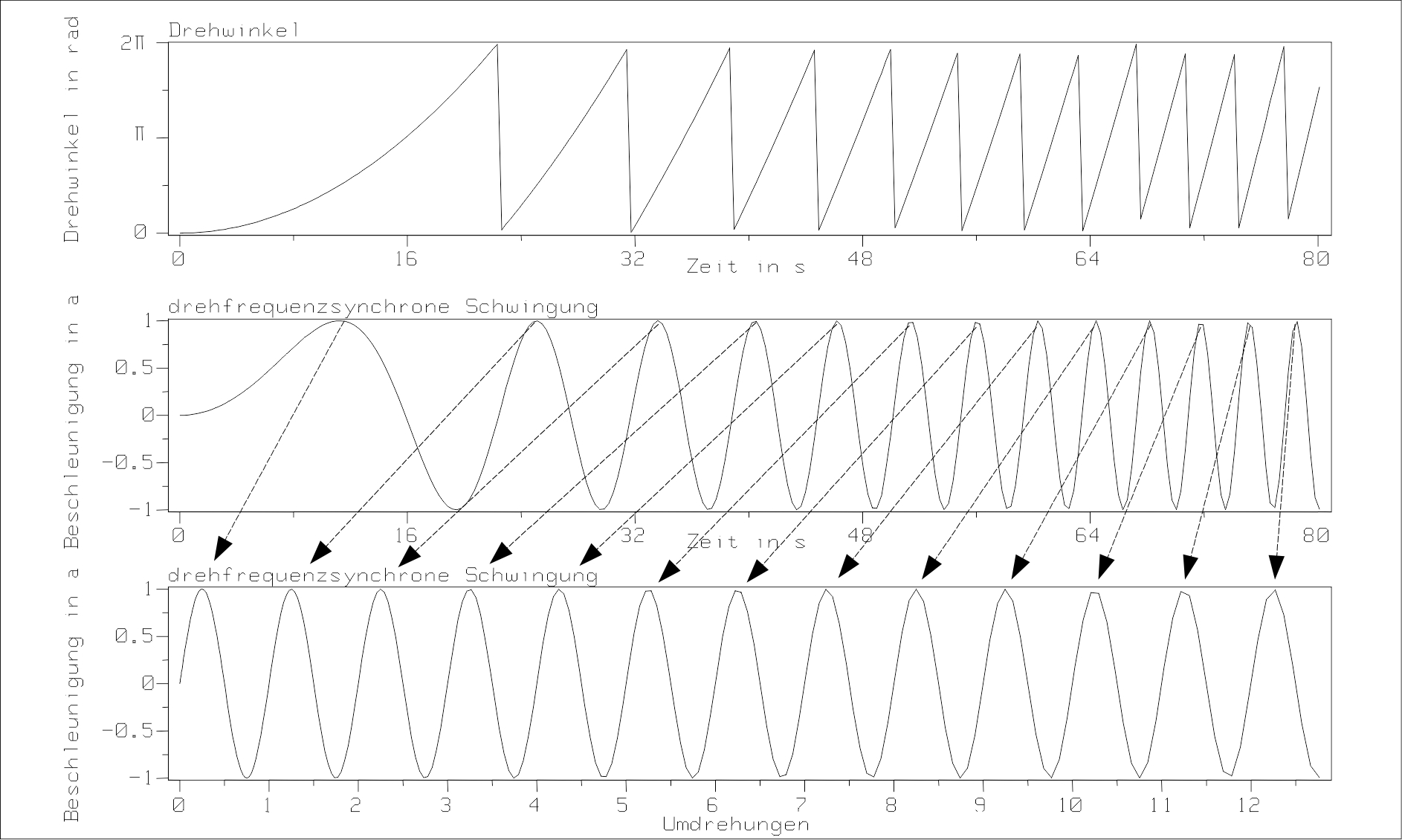 Ordnungsanalyse